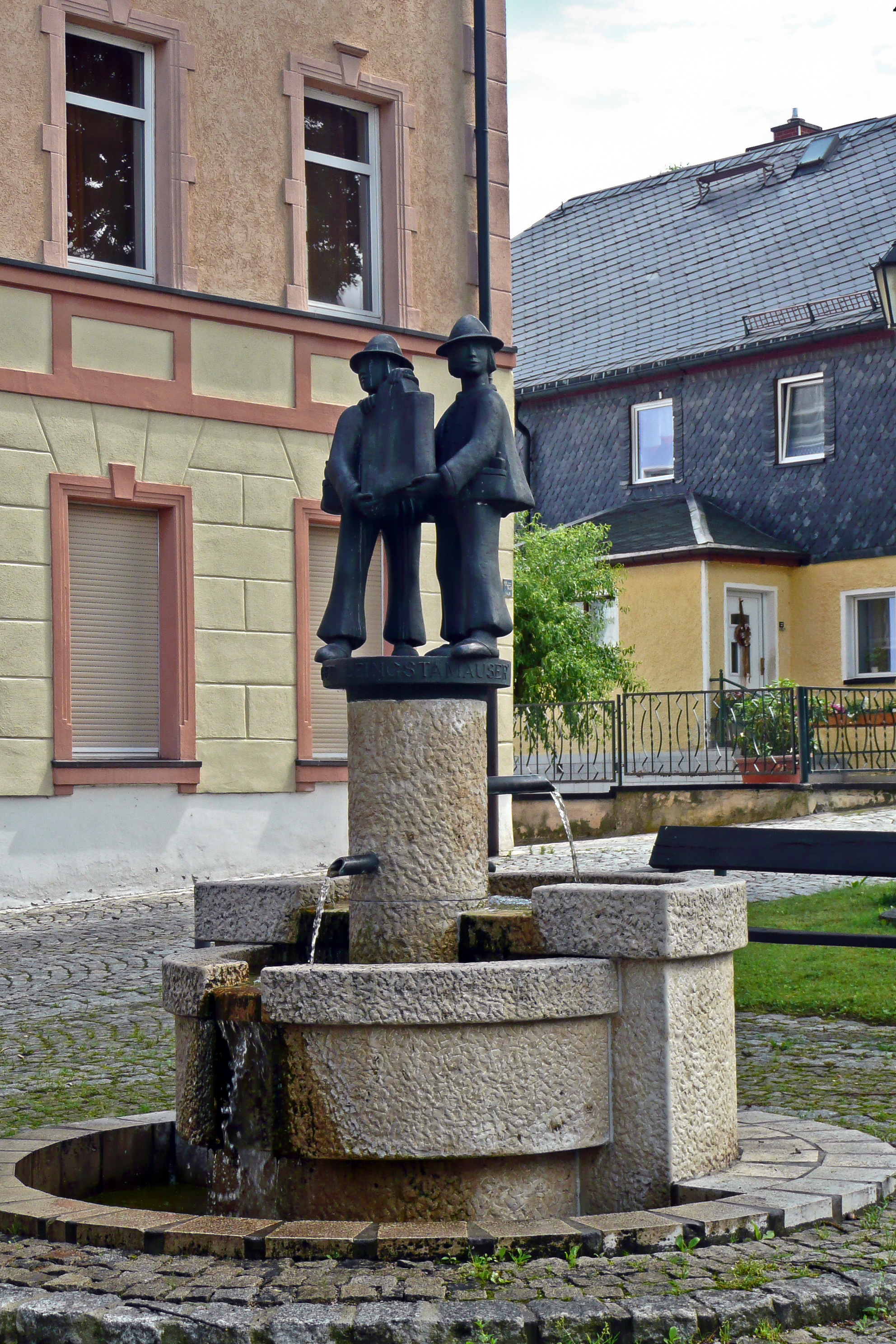 Der Ortsneckname der Einwohner von Harra ist "Harcher Leingstamauser". Der Brunnen auf dem Dorfplatz zeigt eine figürliche Interpretation.